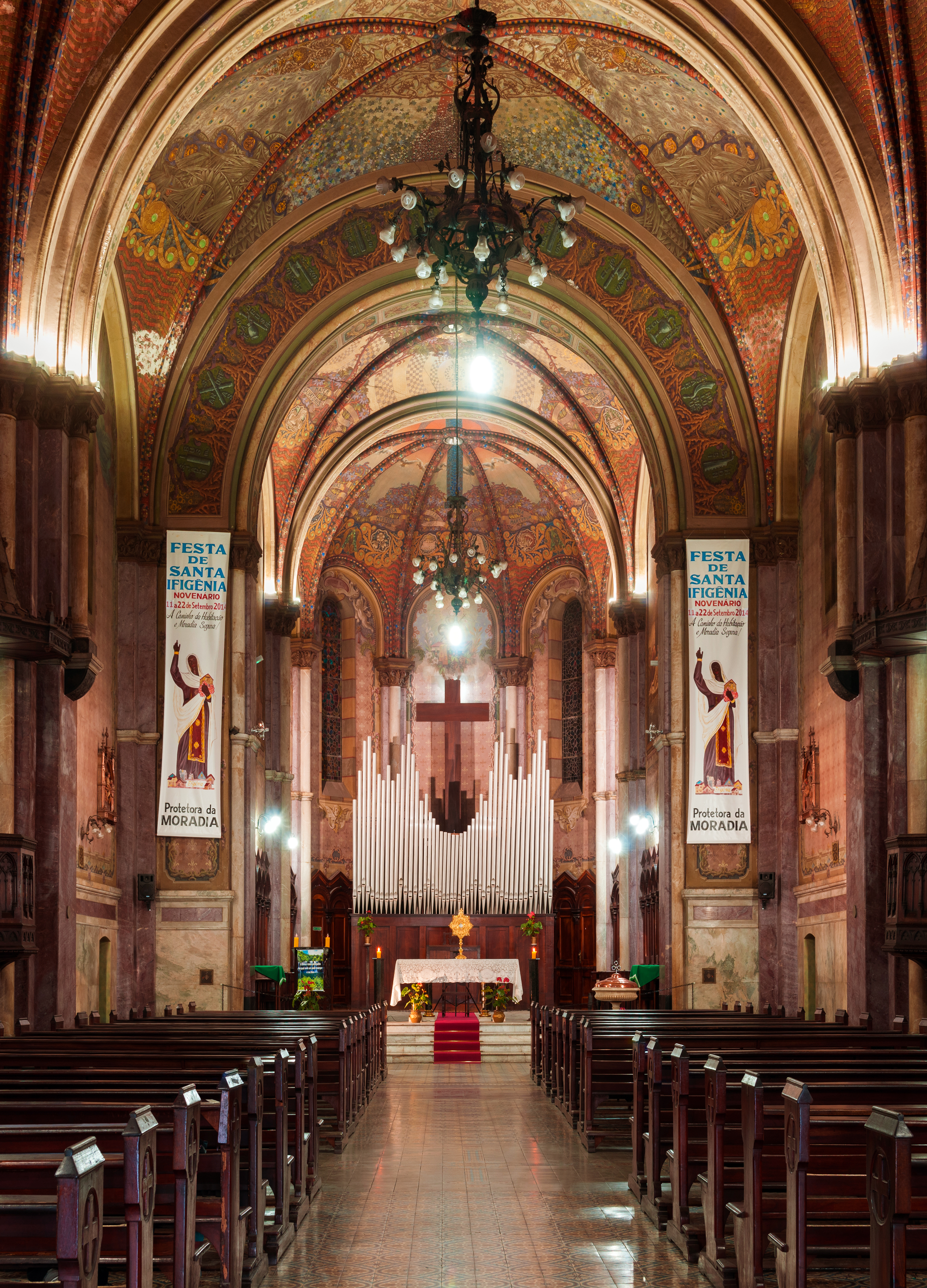 Paróquia Nossa Senhora da Conceição (Santa Ifigênia)